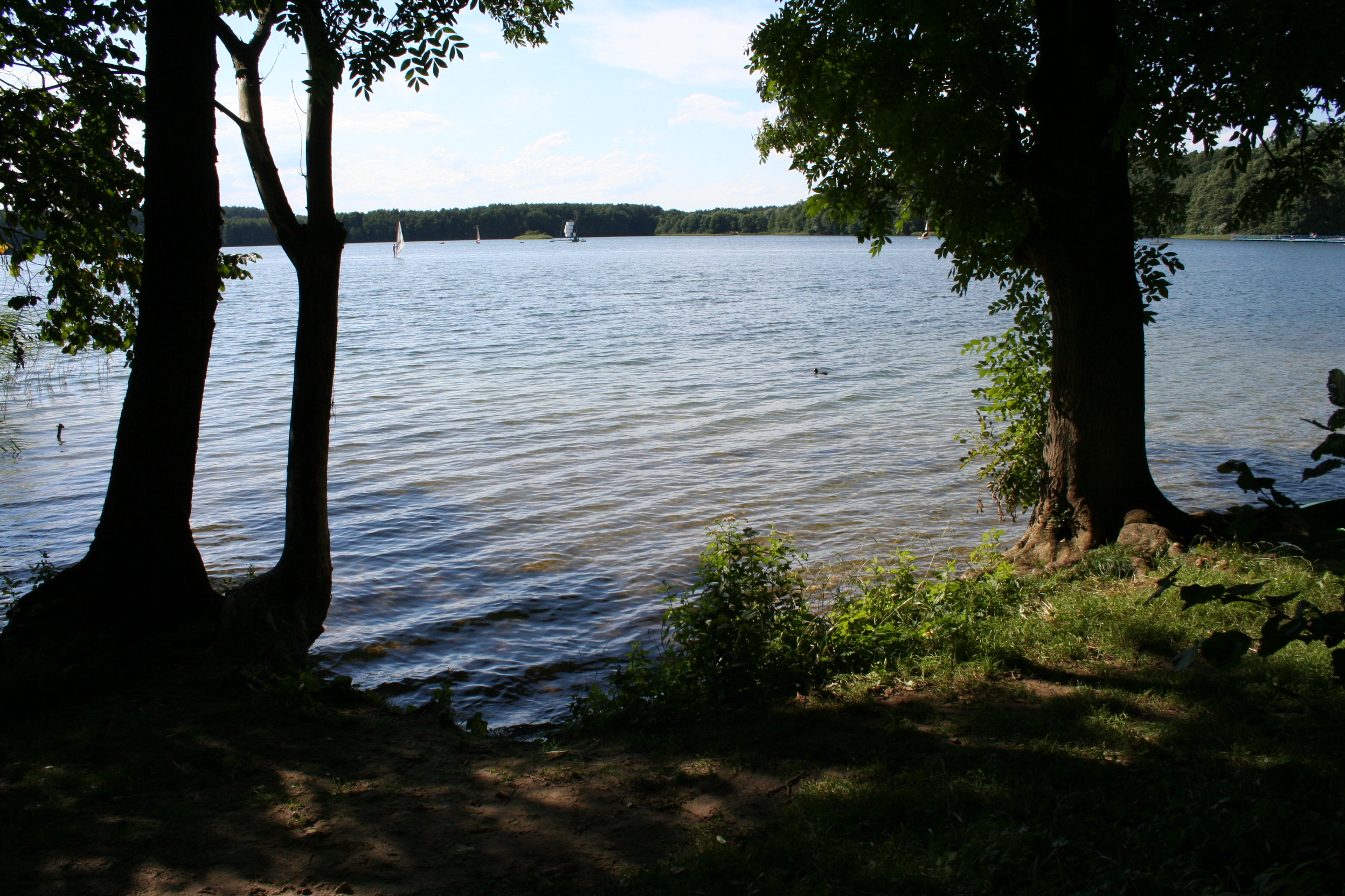 Lato 2007 nad Jez. Jaroszewskim 1